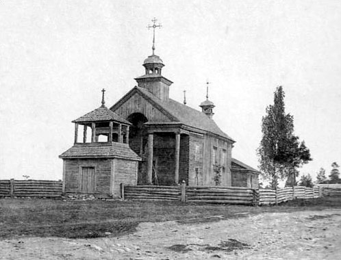 Беларуская (тарашкевіца): Шклянцы (Šklancy). Царква